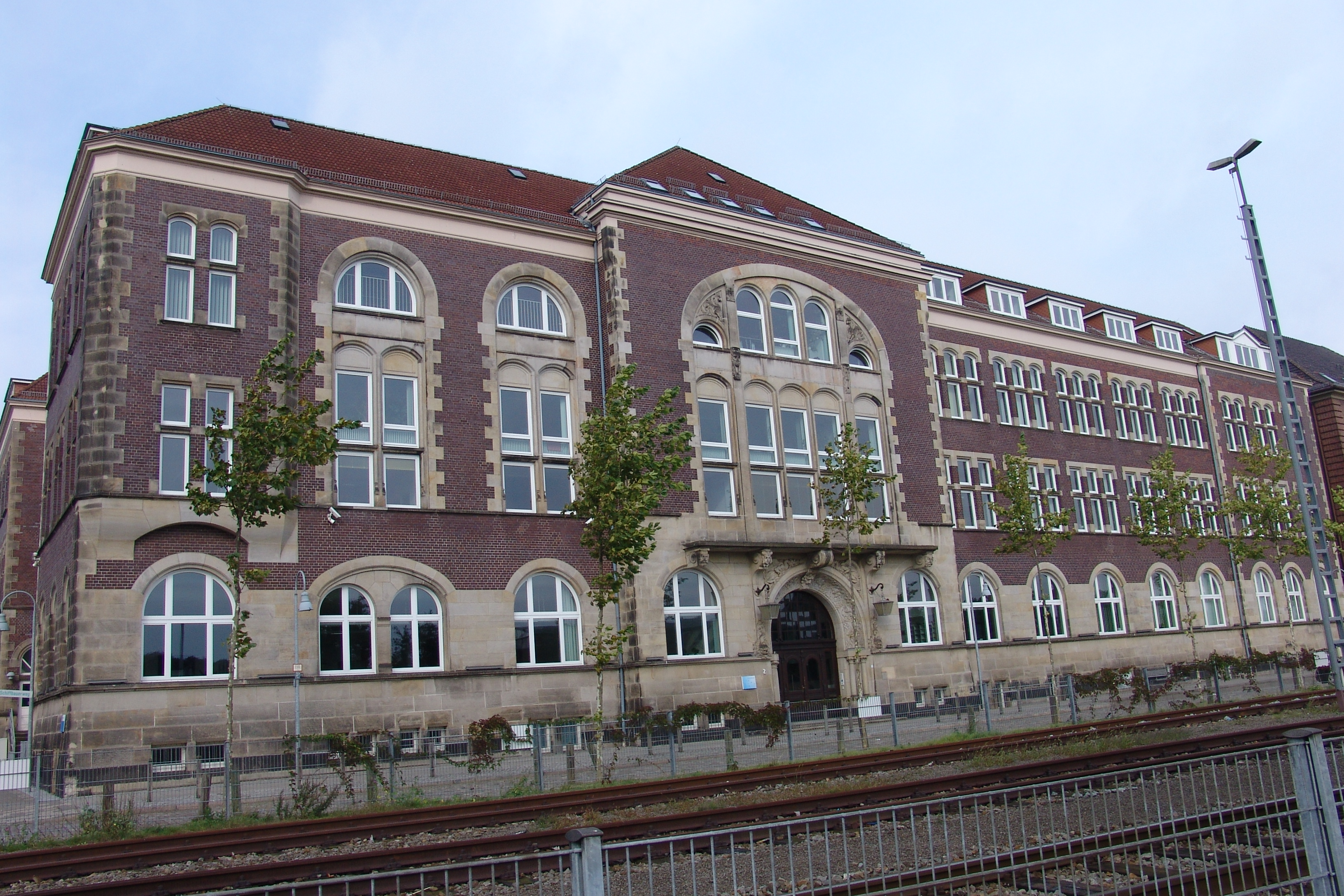 A.G. "Weser", Verwaltungsgebäude in Bremen, Schiffbauerweg 2 / Hermann-Prüser-Straße, Ludwig-Plate-Straße.Das abgebildete Objekt ist ein geschütztes Kulturdenkmal in der Freien Hansestadt Bremen, mit der Nr. 1746 beim Landesamt für Denkmalpflege registriert.